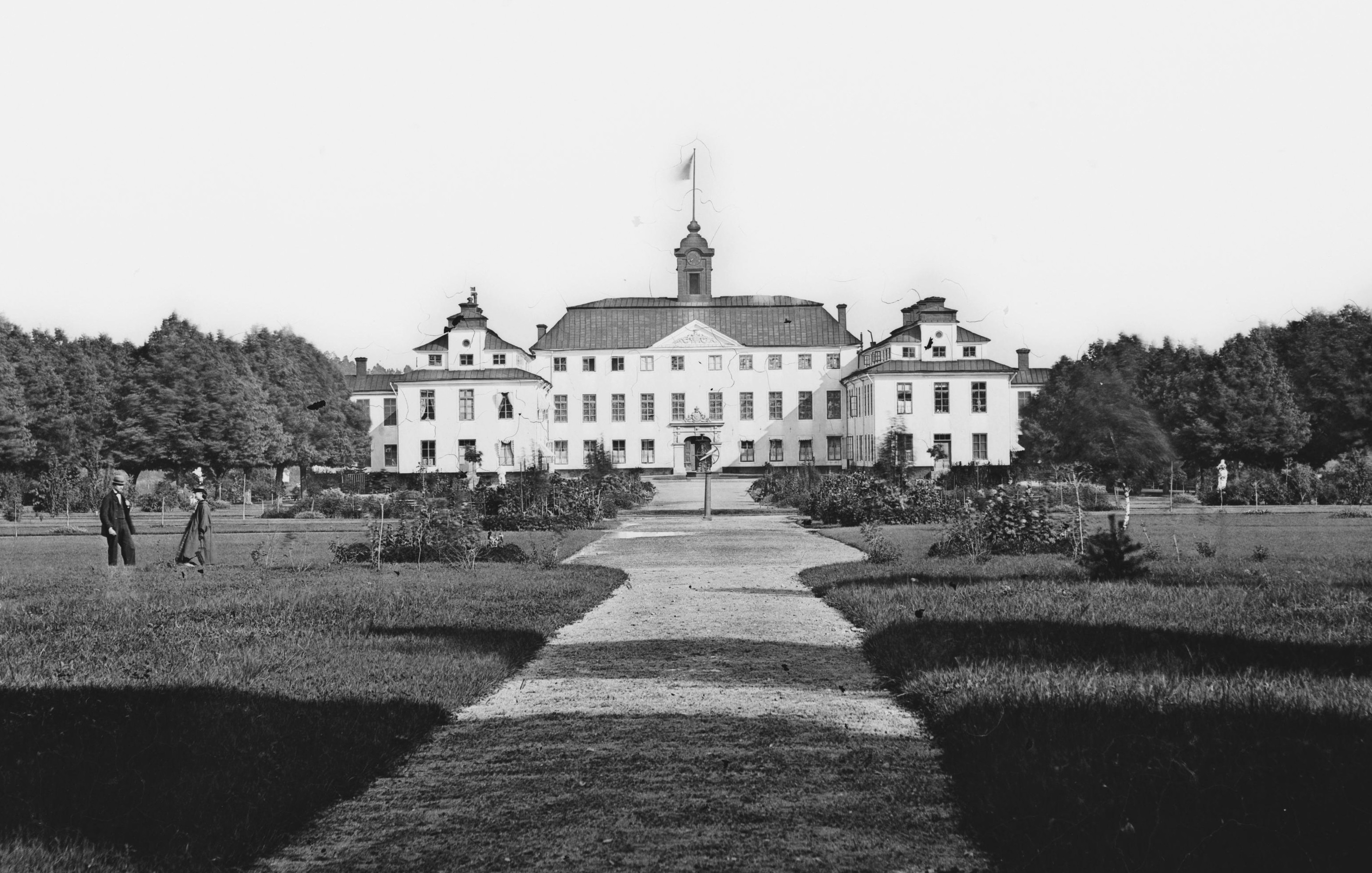 Sted: Kommune: Solna Fylke: Stockholm Tagger